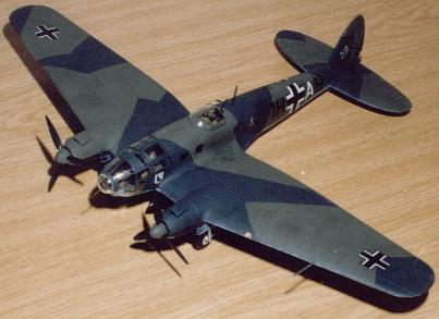 He 111 H-6-Modell